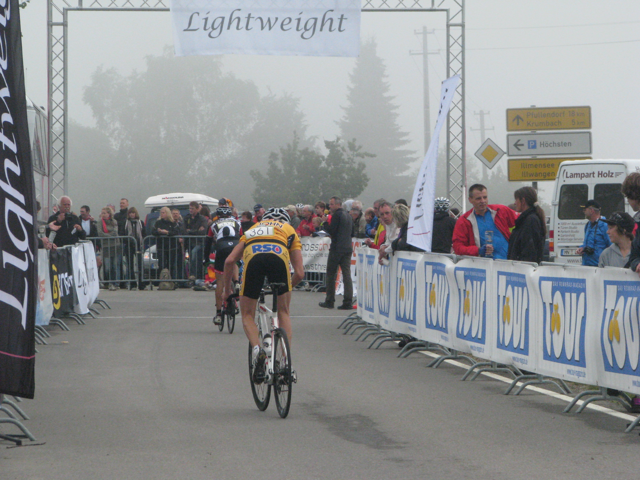 Lightweight Uphill 2010